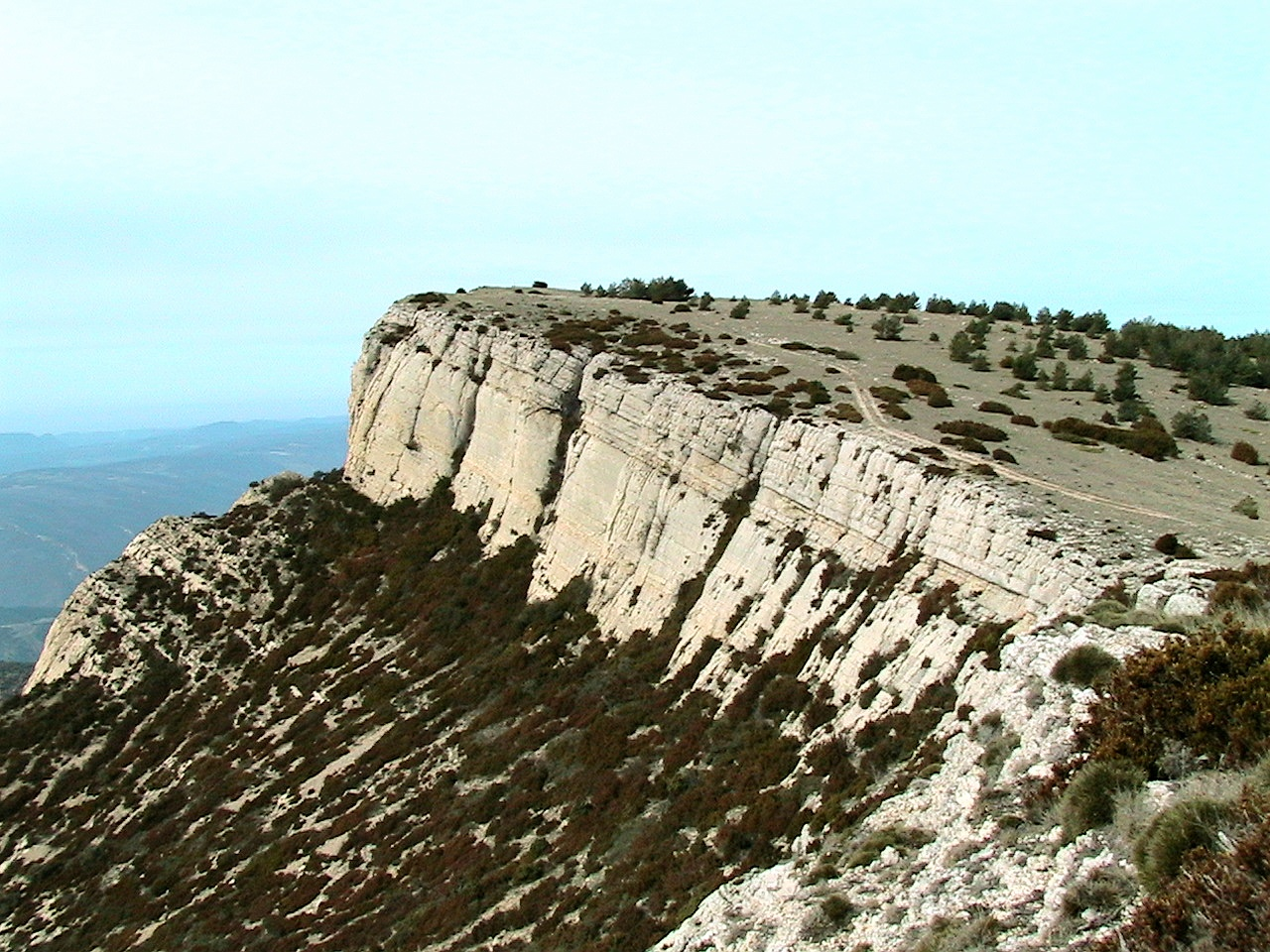 Punta del Tossal de les Torretes, al Montsec de Rúbies (Pallars Jussà - Catalunya)